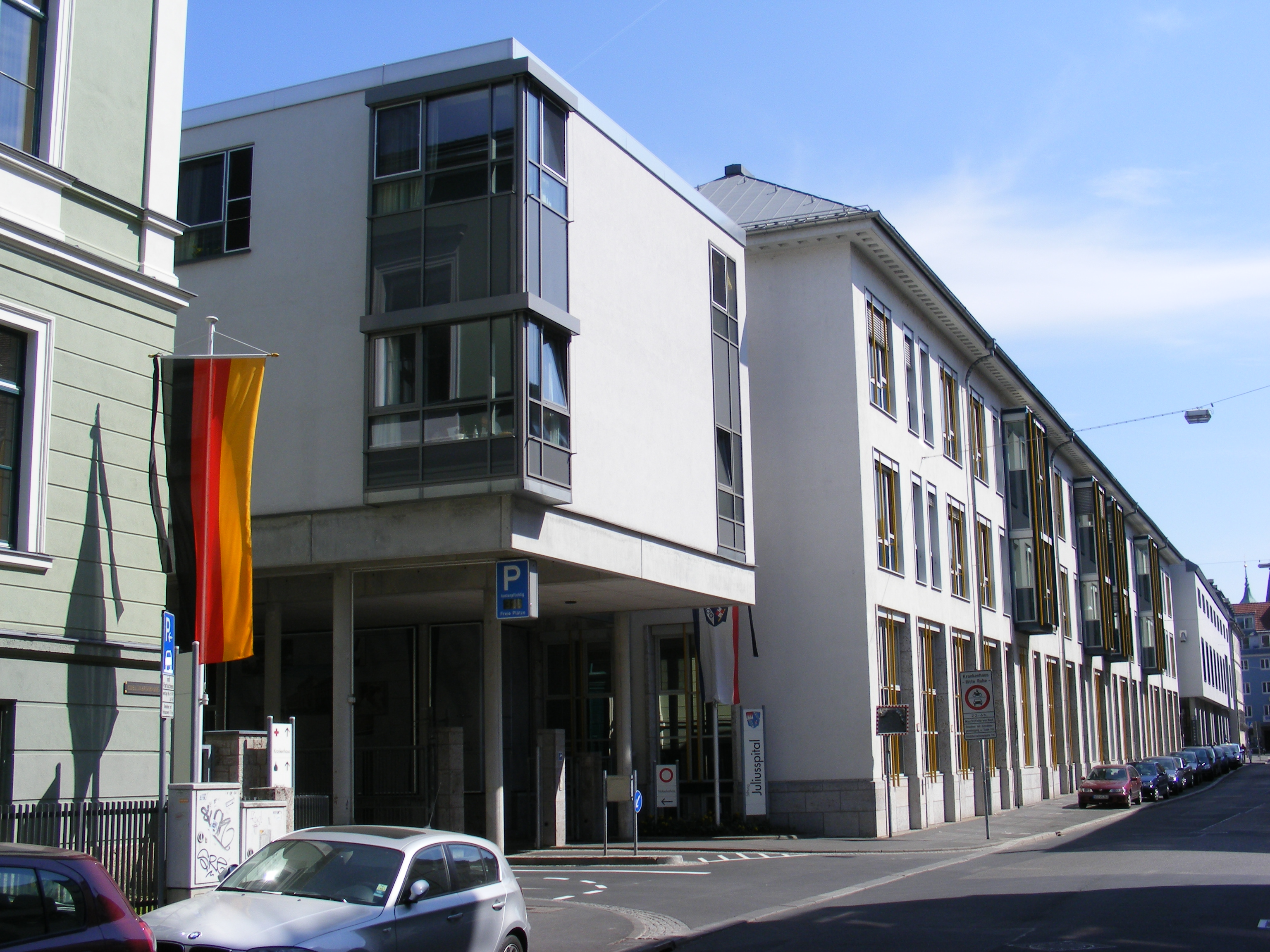 Würzburg - Stiftung Juliusspital, Koellikerstraße (Krankenhaus).